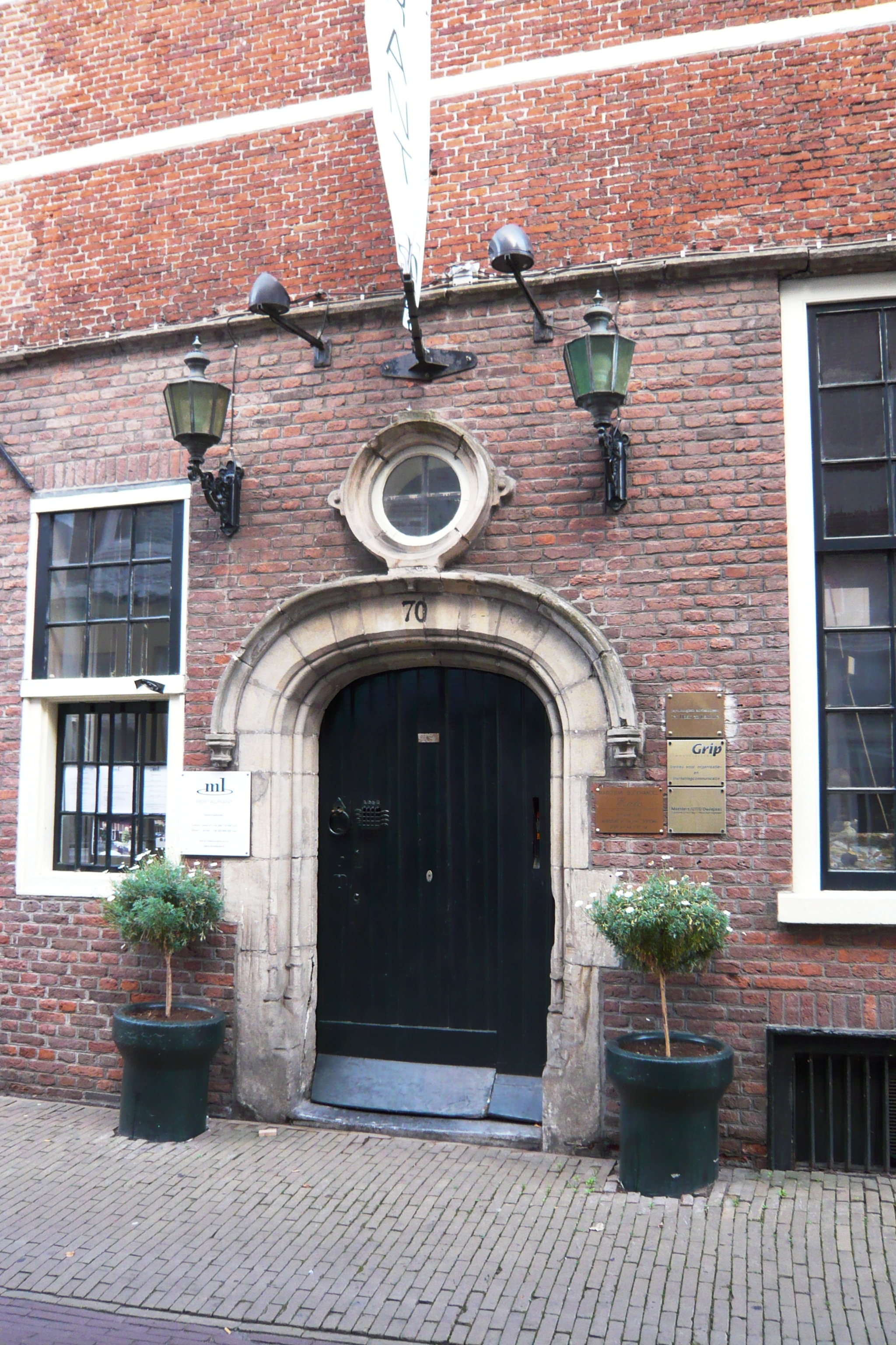 Vormalige Bank van Lening, Kleine Houtstraat, Haarlem